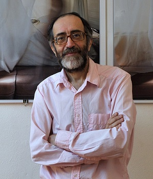 Pio Tarantini